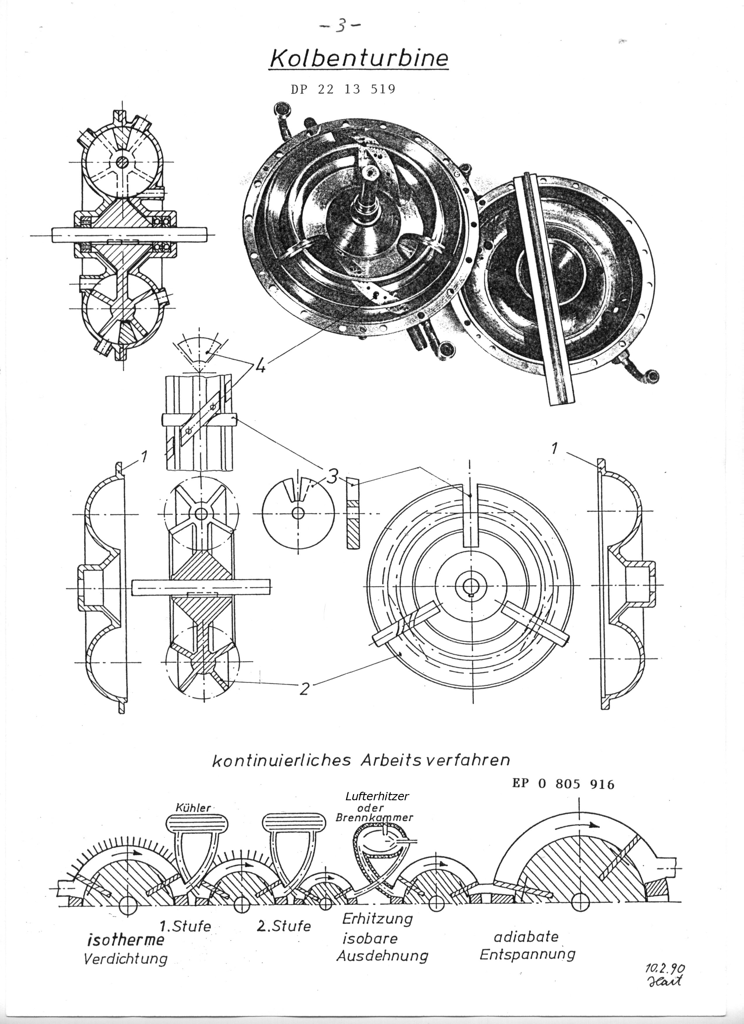 Ein kontinuierlich arbeitender Drehkolbenmotor EP 0 805 916 ist ein stetig fördernder, mehrstufig, möglichst isotherm verdichtender Rotationskolbenverdichter, und ein etwa doppelt so großer Heiß-Druckluftmotor in einer Maschine. Die Erhitzung der verdichteten Arbeitsluft, zur isobaren Ausdehnung und Arbeitsleistung, erfolgt durch ununterbrochene Gleichdruckverbrennung in einer externen Brennkammer; wie bei kleinen Gasturbinen.